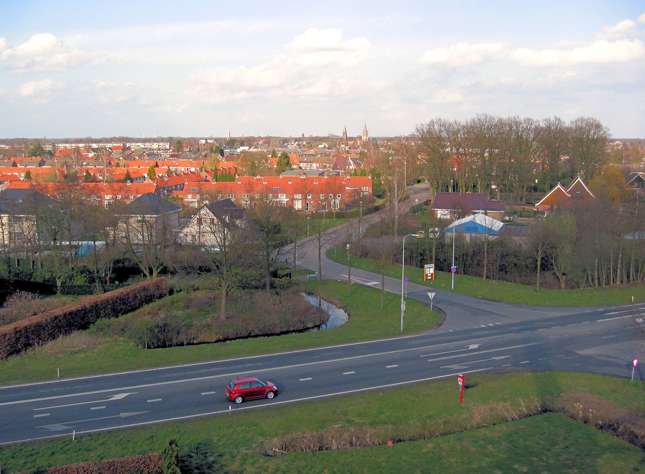 Winterswijk gezien vanaf de Venemansmolen